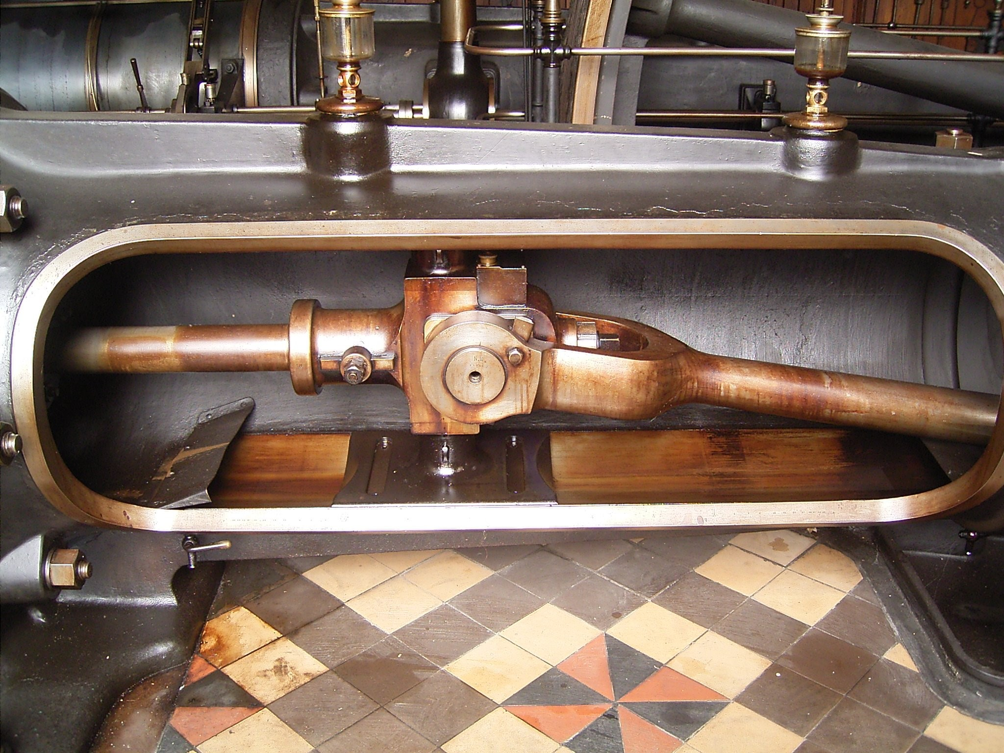 Dampfmaschine im Wülfing-Museum in Radevormwald-Dahlerau